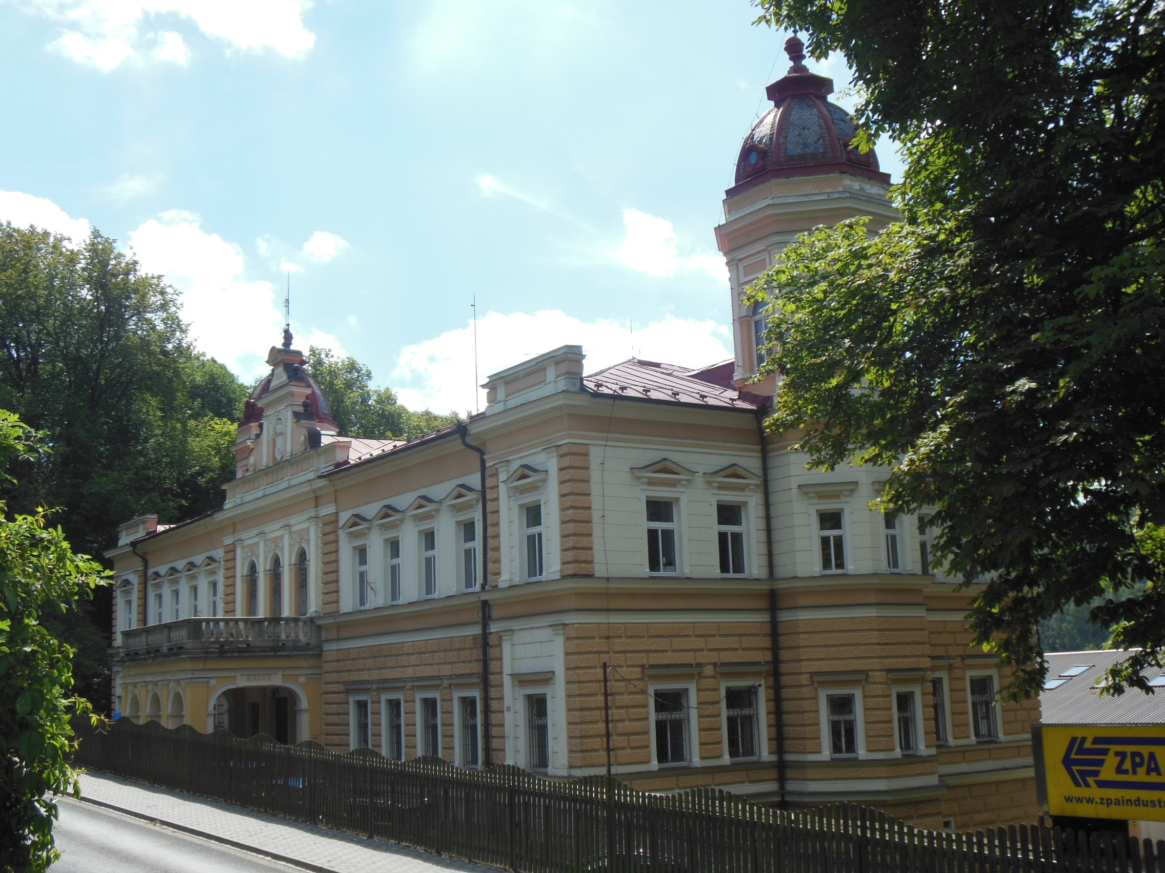 Zámek v ulici Karlovarská v Nejdku (okres Karlovy Vary).